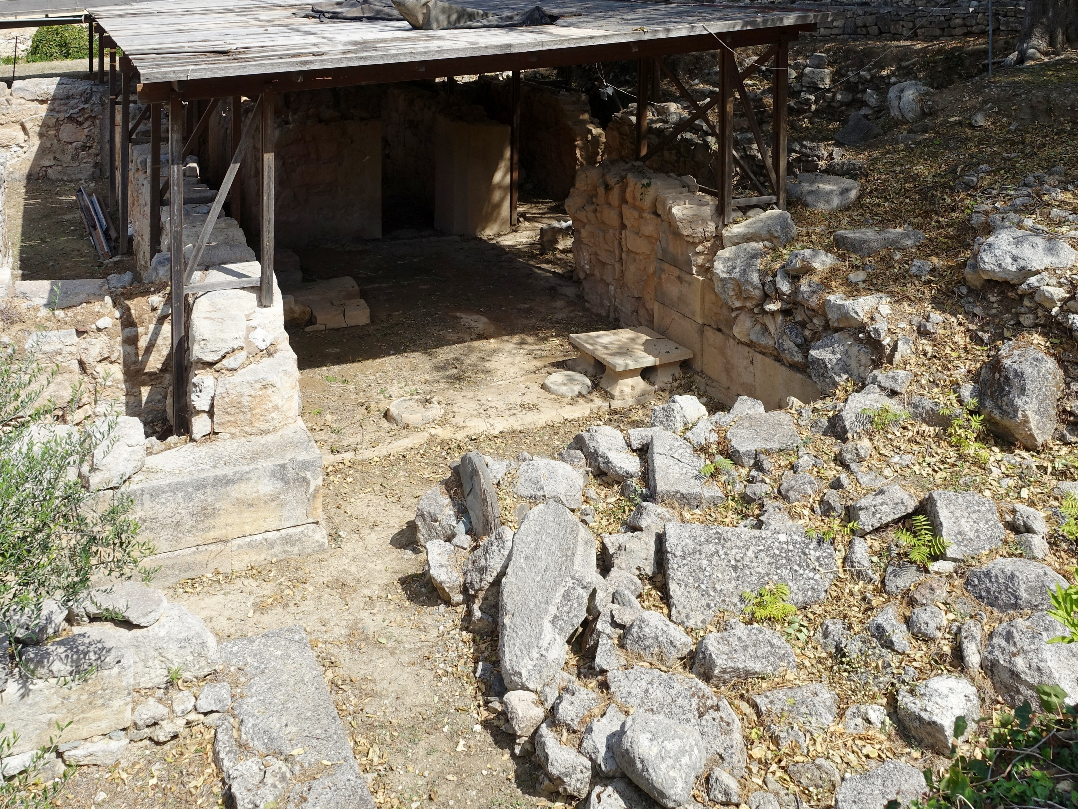 Ausgrabungsstätte des „Palastes“ von Archanes (Αρχάνες), Gemeinde Archanes-Asterousia, Kreta, Griechenland